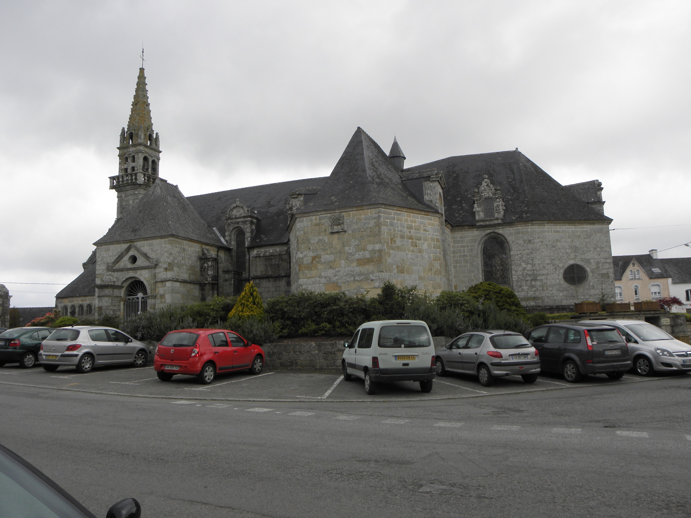 Église Saint-Yves de Plouray (56). Vue méridionale.